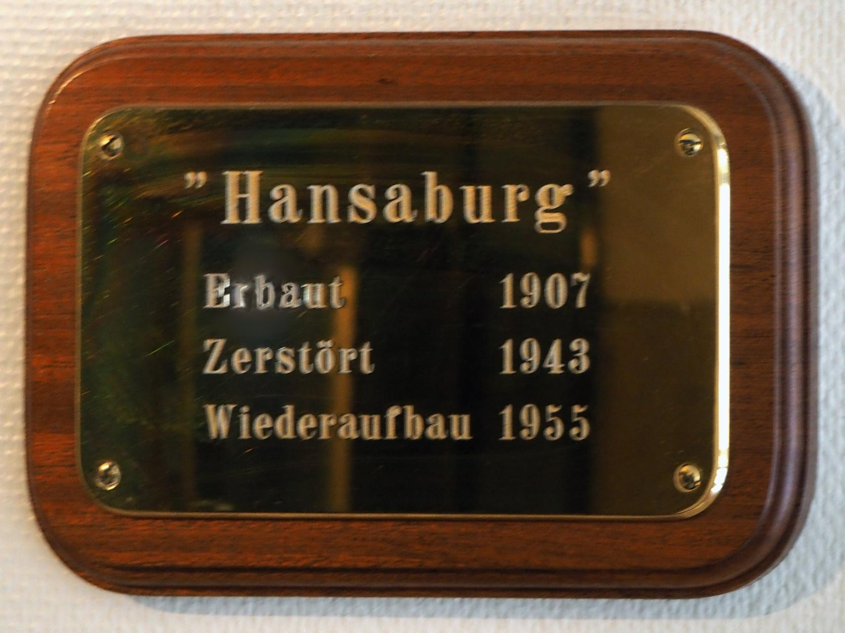 Hamburg-Altstadt, Kontorhaus Hansaburg, Schild, Foto: Dezember 2015